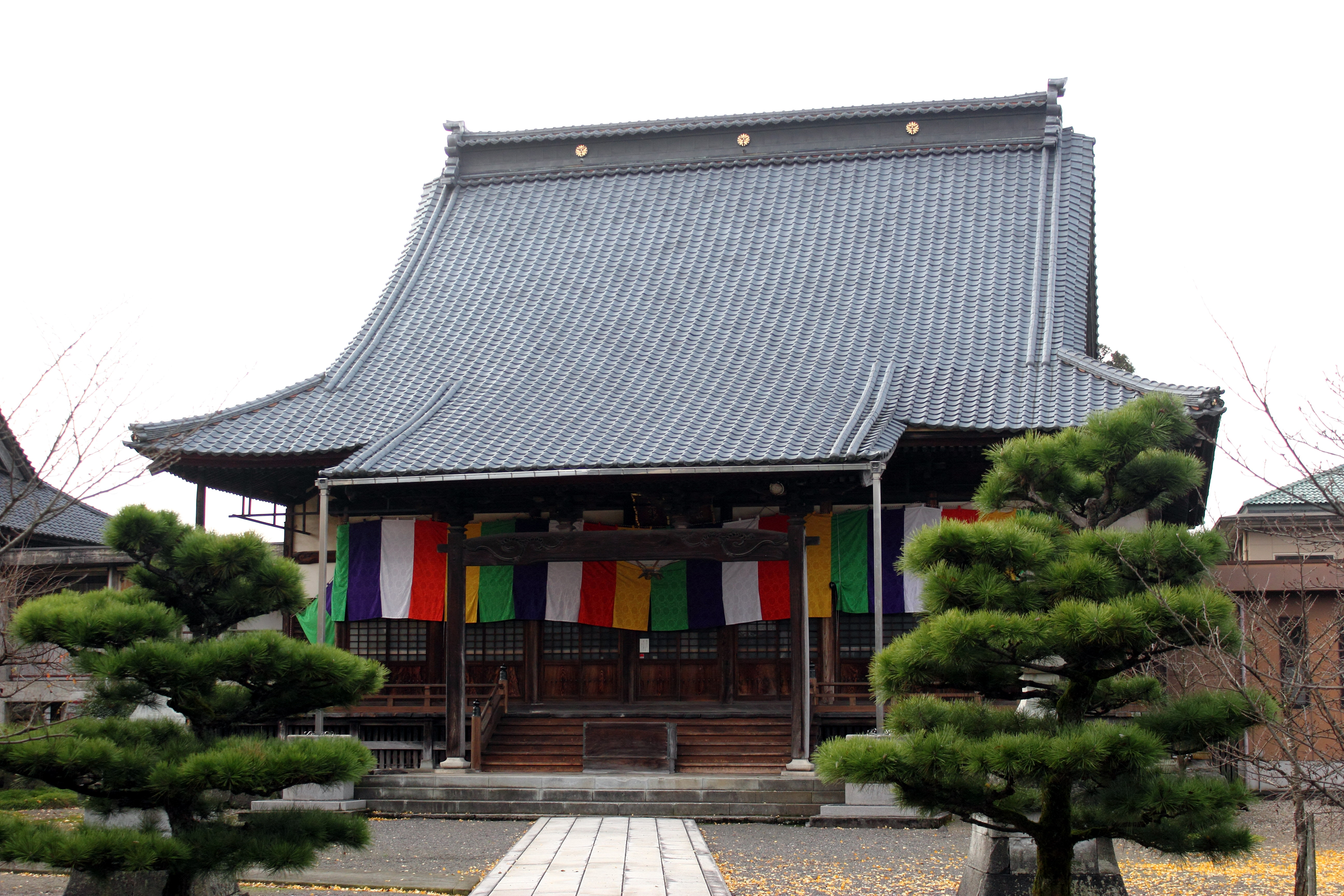 證誠寺 (鯖江市)